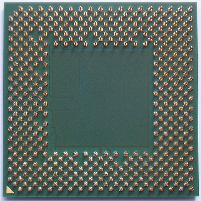 Beschreibung: AMD Sempron 2200+ / 1500 MHz / backside Fotograf: Darkone, 22. Juli 2005